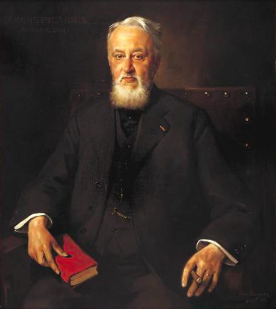 M.E. Houck